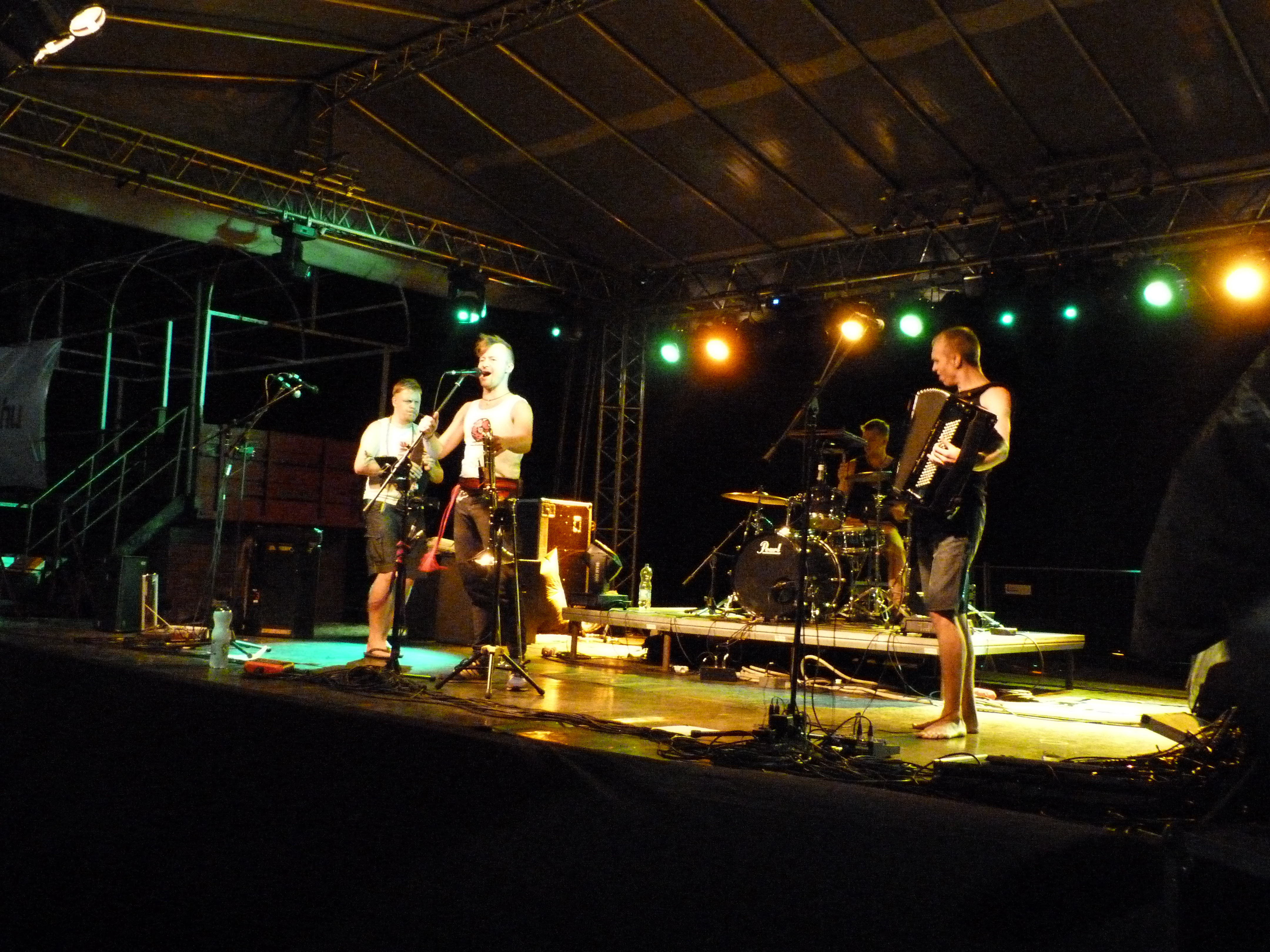 A felvétel 2014. augusztus 6-án, szerdán készült Nagyharsányban a focipályán. 7. Ördögkatlan Fesztivál. Svjata Vatra együttes (Észt-ukrán). ©© Derzsi Elekes Andor, Budapest, 2014, A kép és filmfelvételek egészben, vagy részletekben másolását, bármilyen úton történő sokszorosítását és felhasználását a szerző ellenérték nélkül, jogutódjaira is kihatóan megengedi. Az engedély kiterjed a kereskedelmi célú hasznosításra is. Kéri azonban nevének feltüntetését a felhasználás során. A Metapolisz sorozat valamennyi képe és filmje Creative Commons alatti valamint kereskedelmi - for profit - célra is felhasználható. Ajánlott hivatkozás: Derzsi Elekes Andor: Metapolisz DVD line